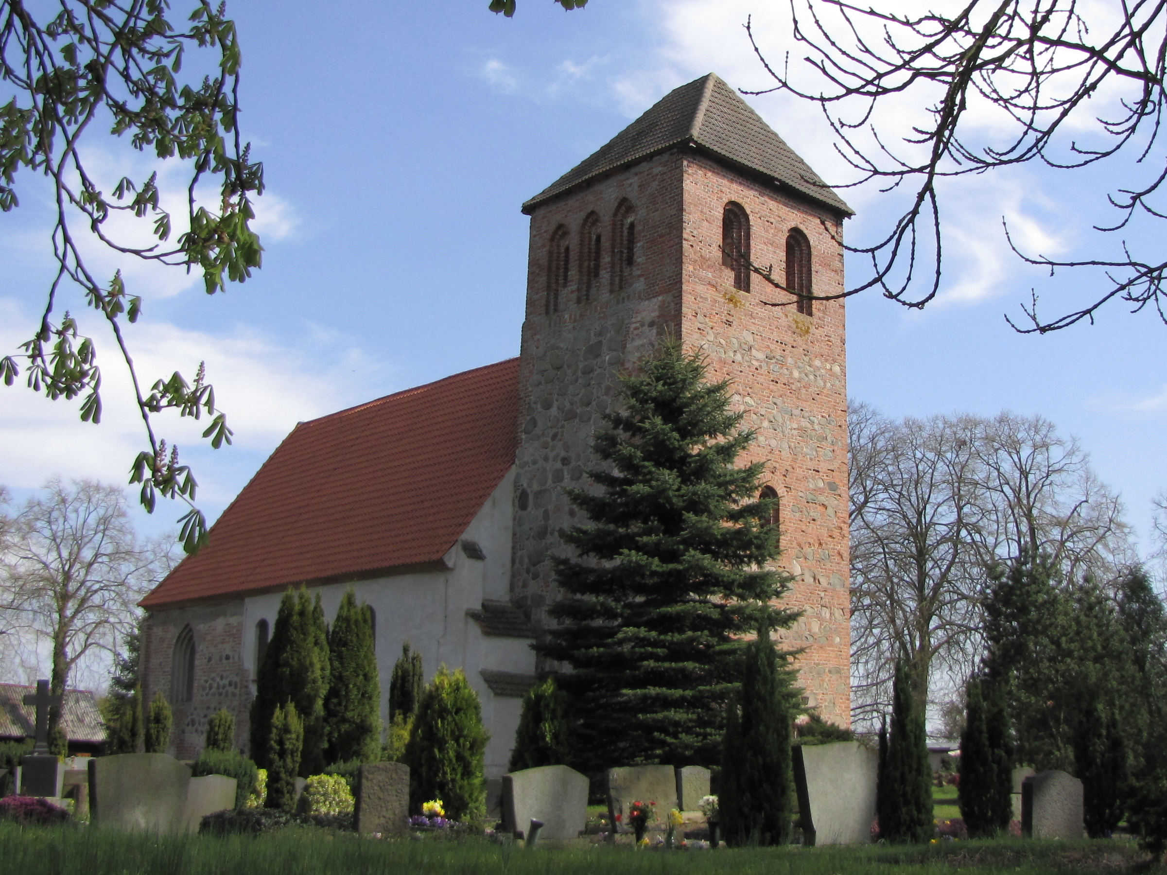 Dorfkirche Beggerow